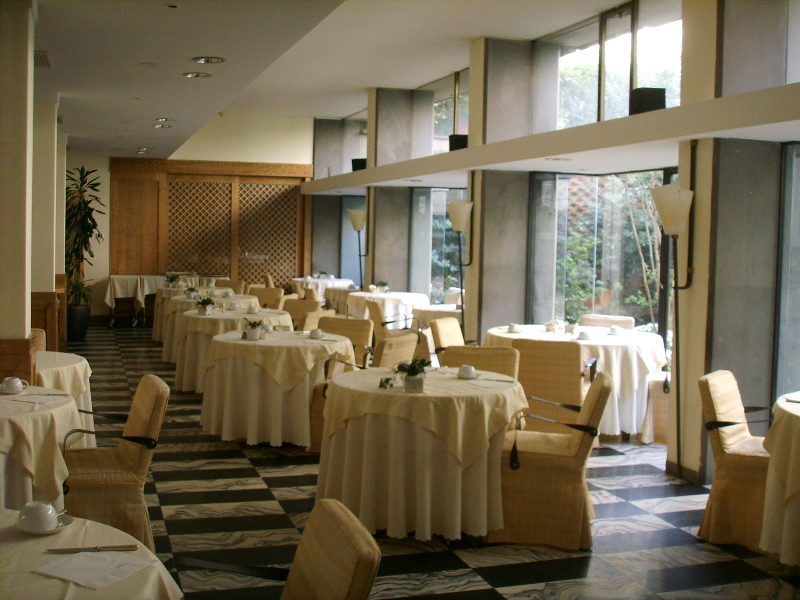 Grand hotel minerva, sala colazioni